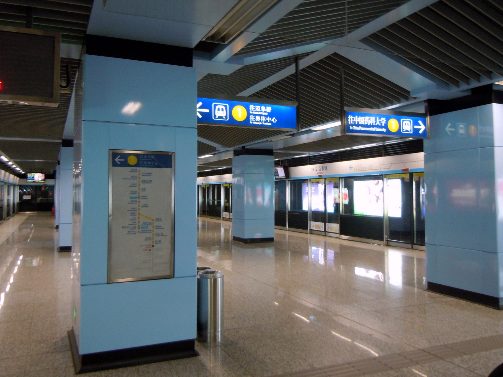 南京地铁百家湖站站台